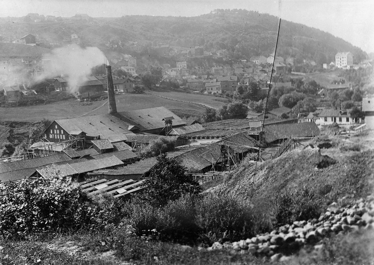 Utsikt mot Svendengen teglverk - ca. 1890, Depicted place: Q12004326